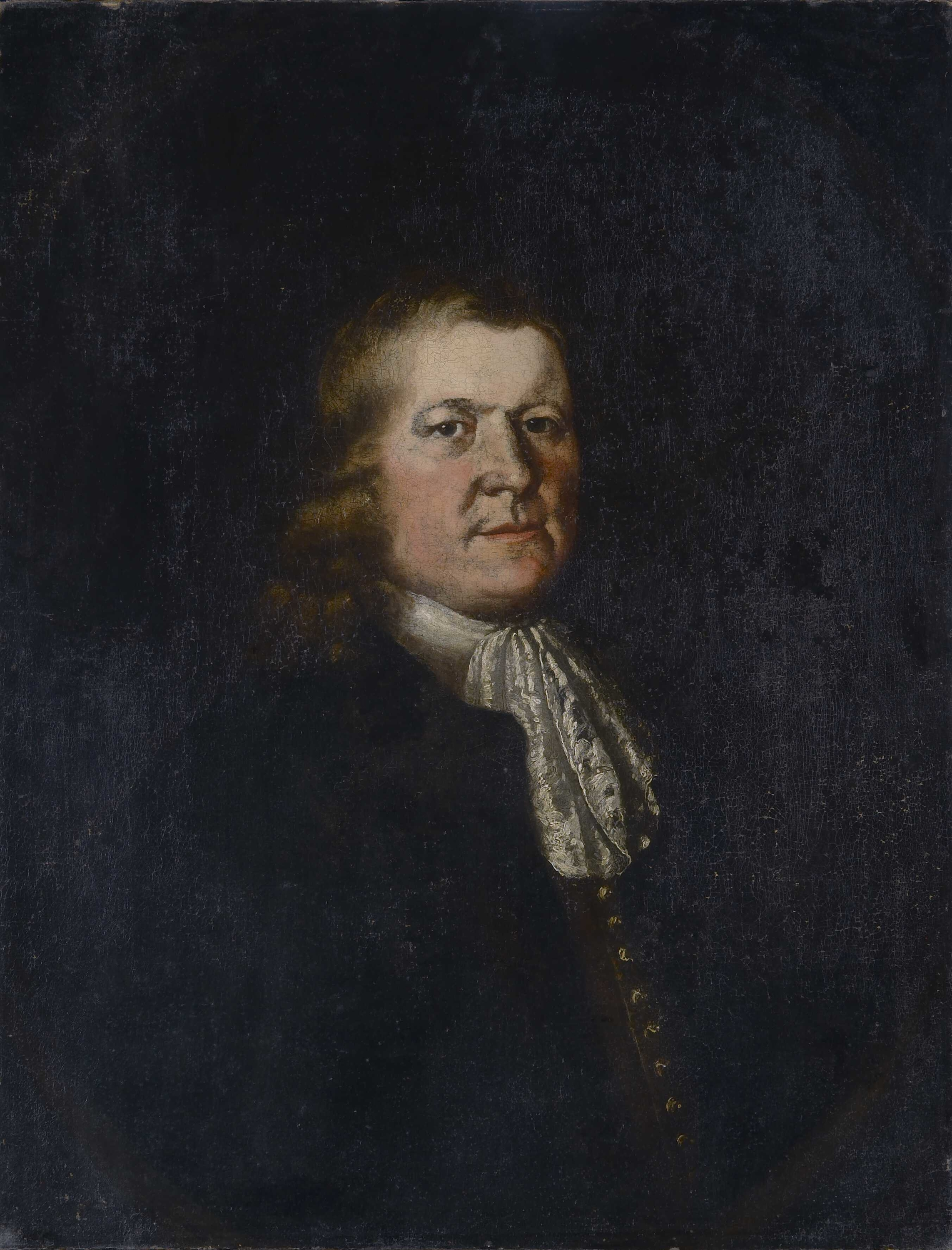 Wittiken Gundersen Huus, lagmann i Christiania. Bodde i lagmannsgården i Christiania (Dronningens gate 15).